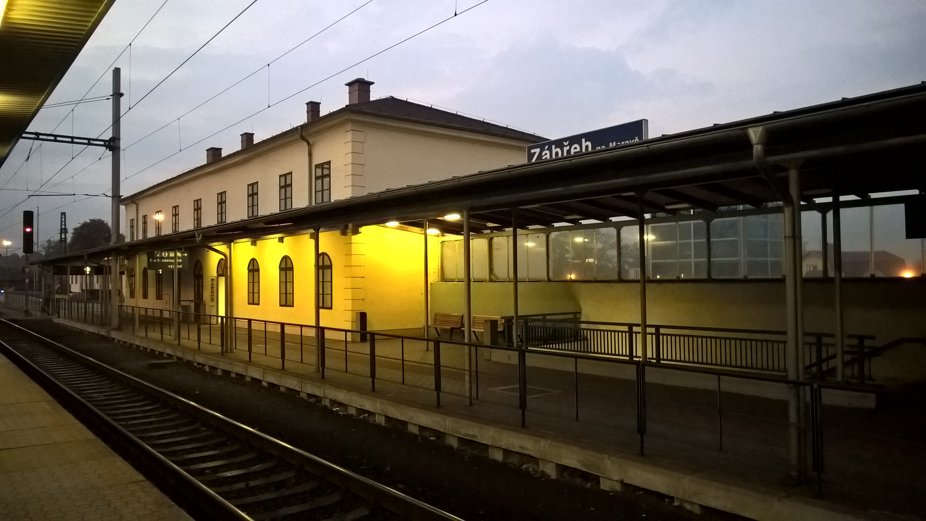 Nádraží Zábřeh na Moravě, U Nádraží 1626/6, 1627/4, Zábřeh.